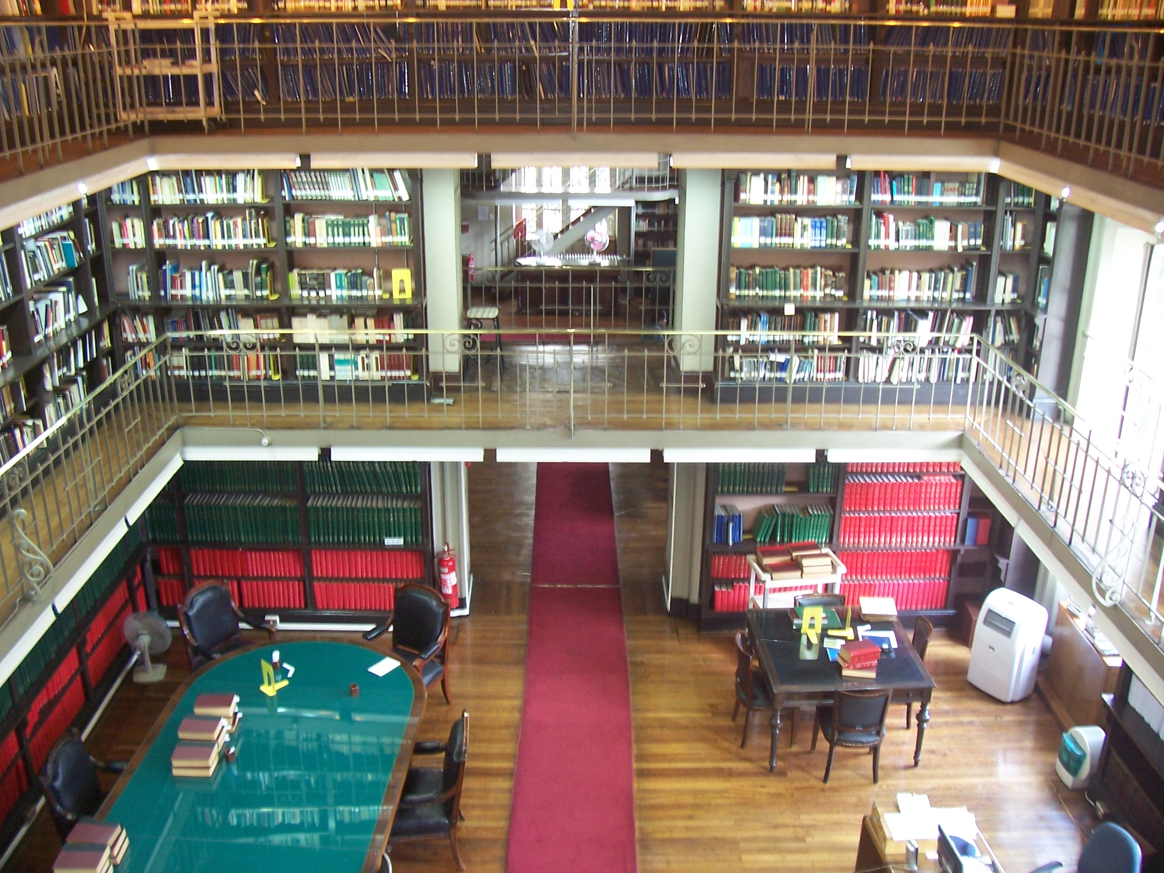 La biblioteca del ex-Congreso Nacional en Santiago de Chile..